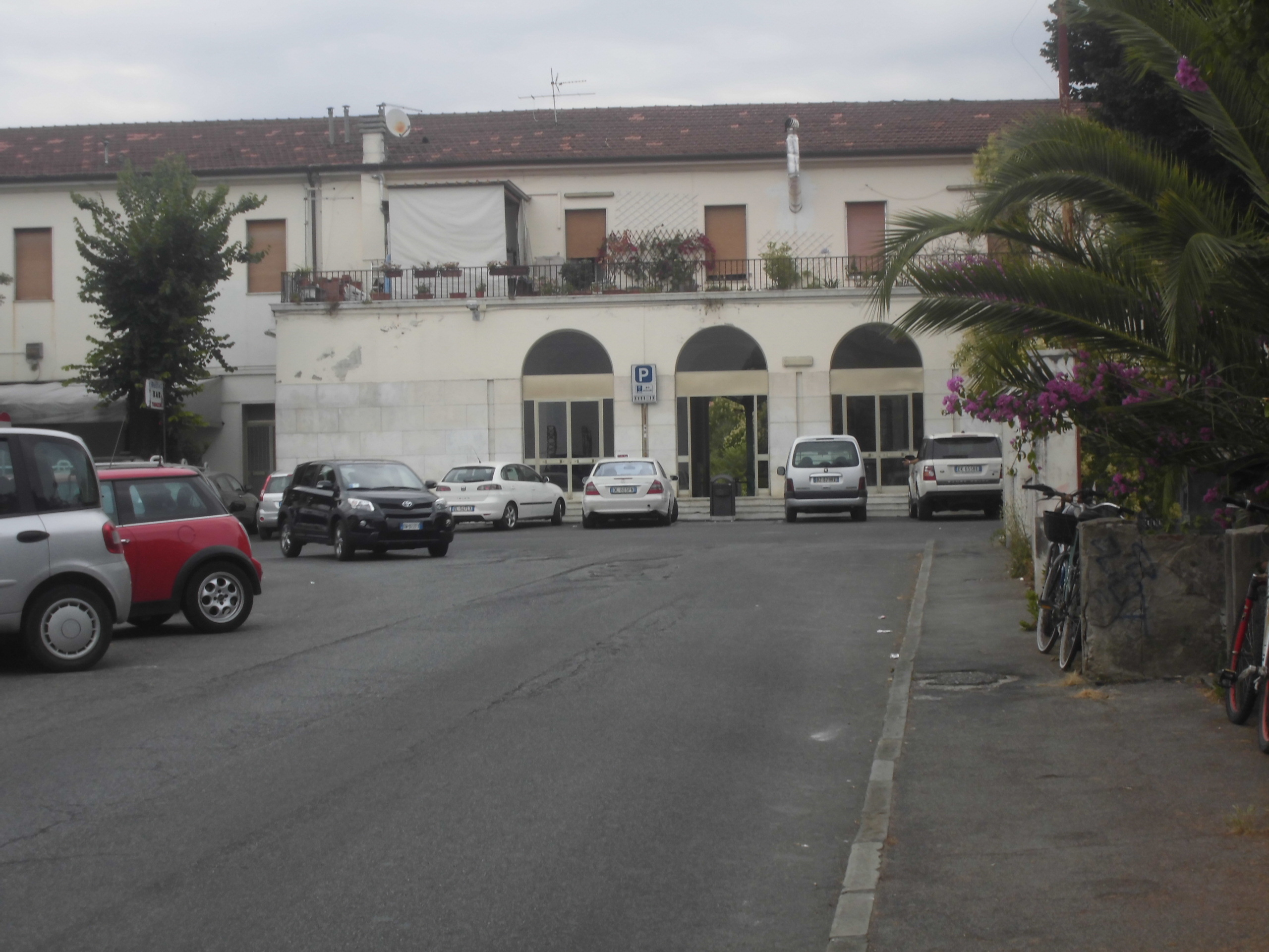 Veduta del fabbricato viaggiatori nel 2013